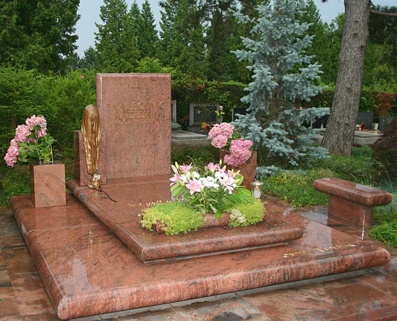 Grob Ene Begović na Mirogoju u Zagrebu